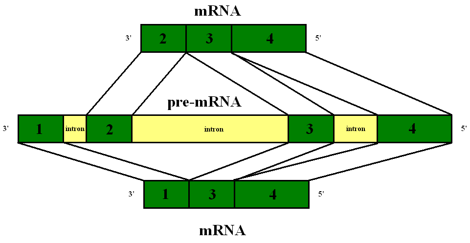 alternativ spleising